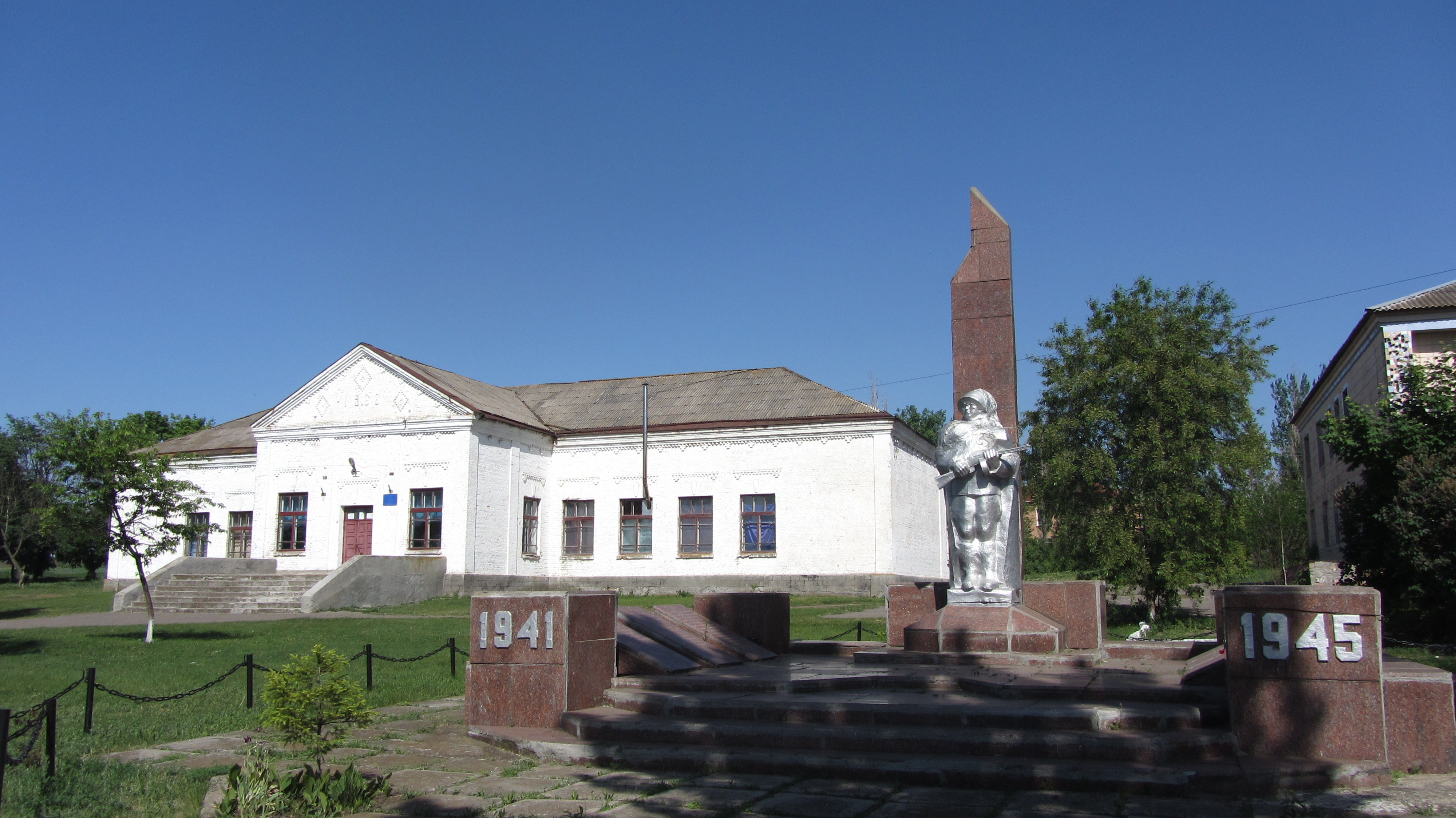 Пам'ятник воїнам-землякам, Буховецьке, біля БК